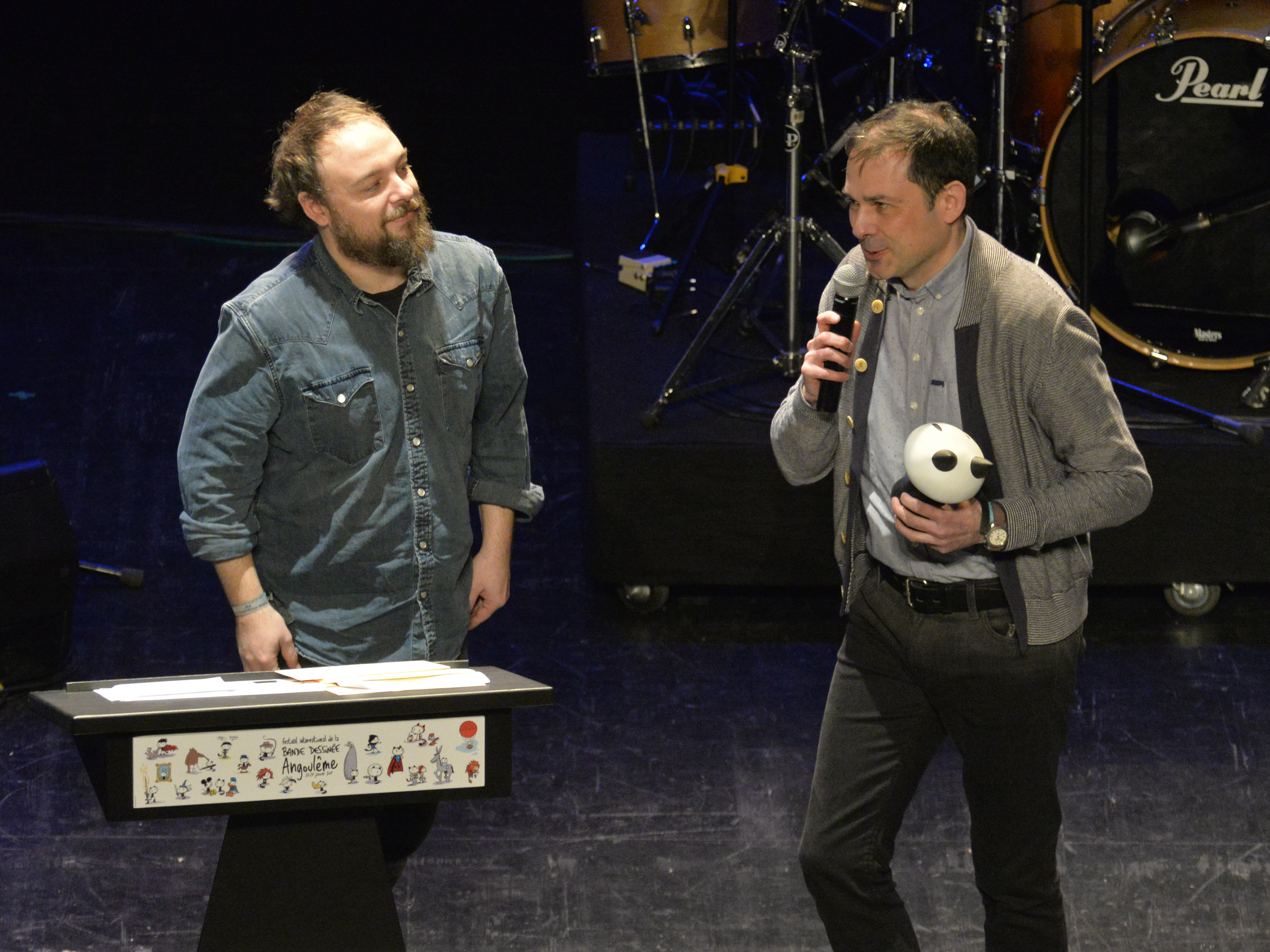 Remise du Fauve de la série à Stéphane Duval, l'éditeur de Chiisakobé de Minetaro Mochizuki par le journaliste Marius Chapuis, Festival International de la Bande Dessinée d'Angoulême 2017.